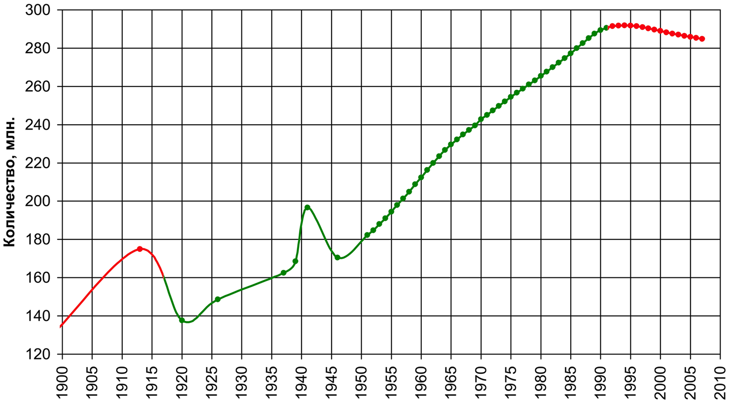 График изменения населения СССР